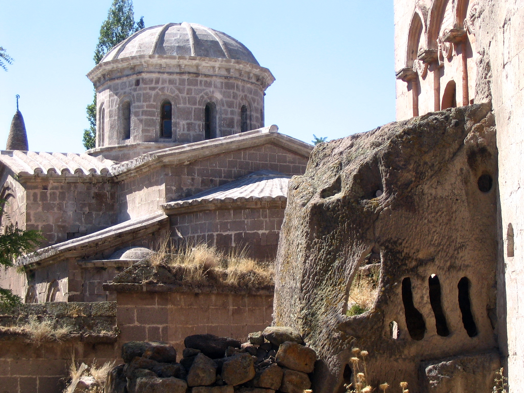 St.Gregorius-Kirche bei Güzelyurt, Kappadokien, Zentraltürkei